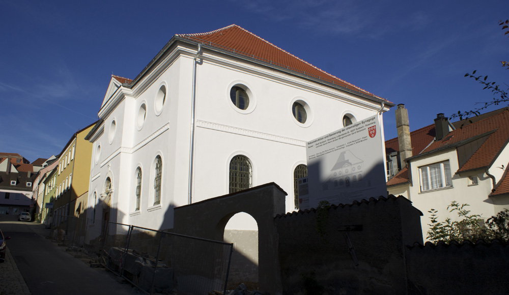 Die ehemalige Synagoge in Sulzbach-Rosenberg am 9. September 2012